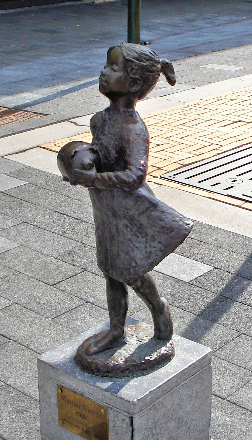 Ridderkerk, St. Jorisplein. Kunstwerk "Meisje met spaarpot" van Marian Kievits. Ridderkerk/The Netherlands. FOP.